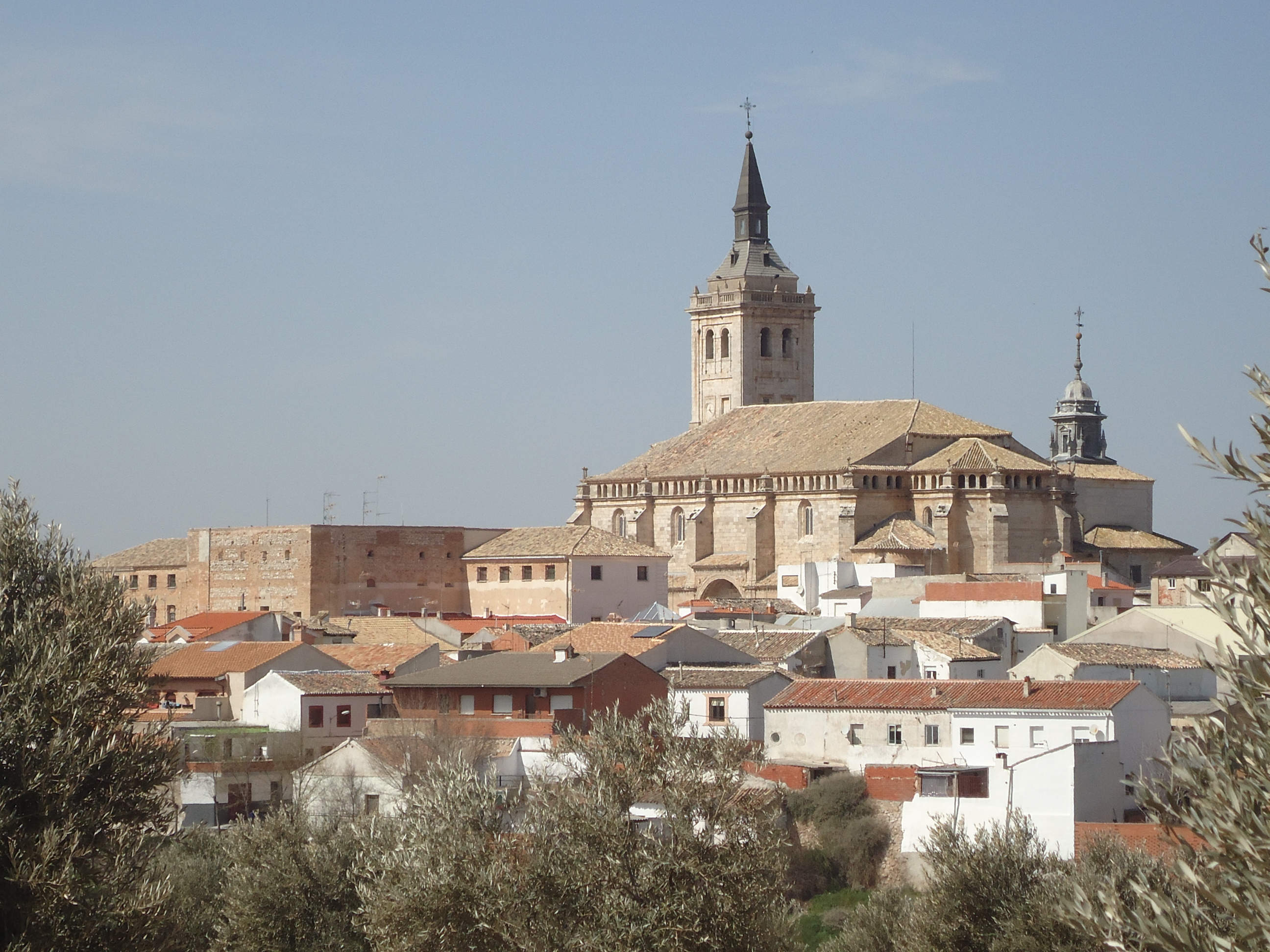 Colegiata y palacio arzobispal